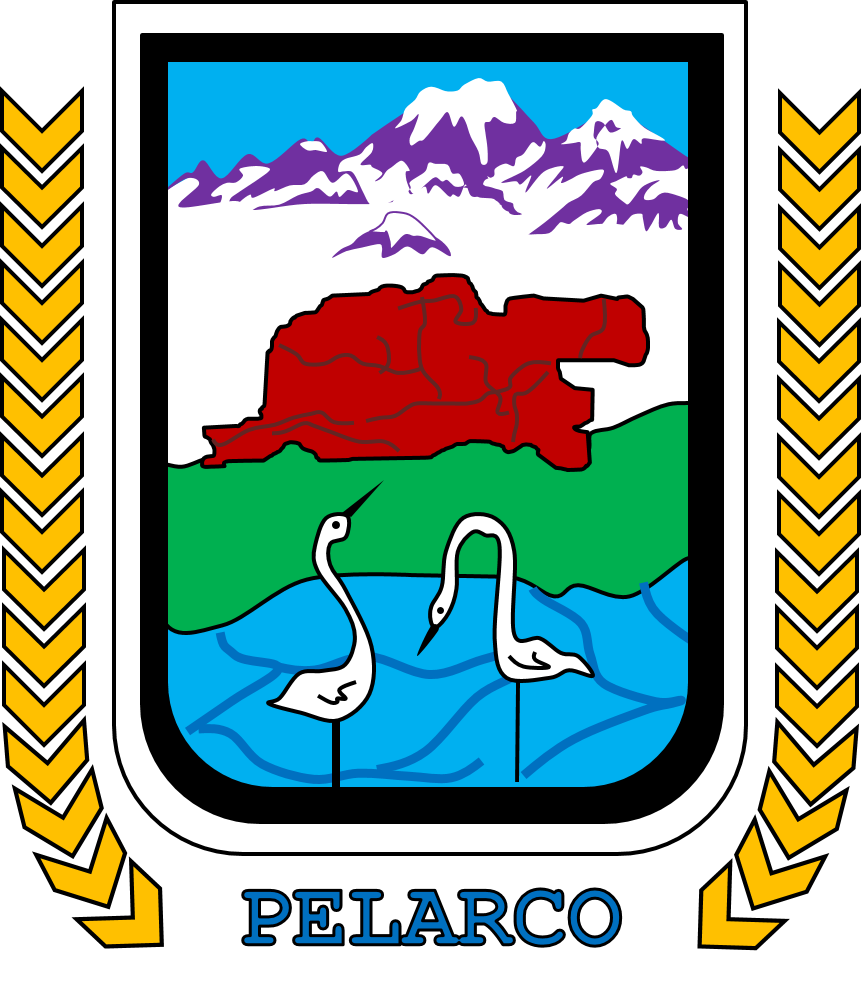 Escudo de armas de la comuna de Pelarco (Chile)